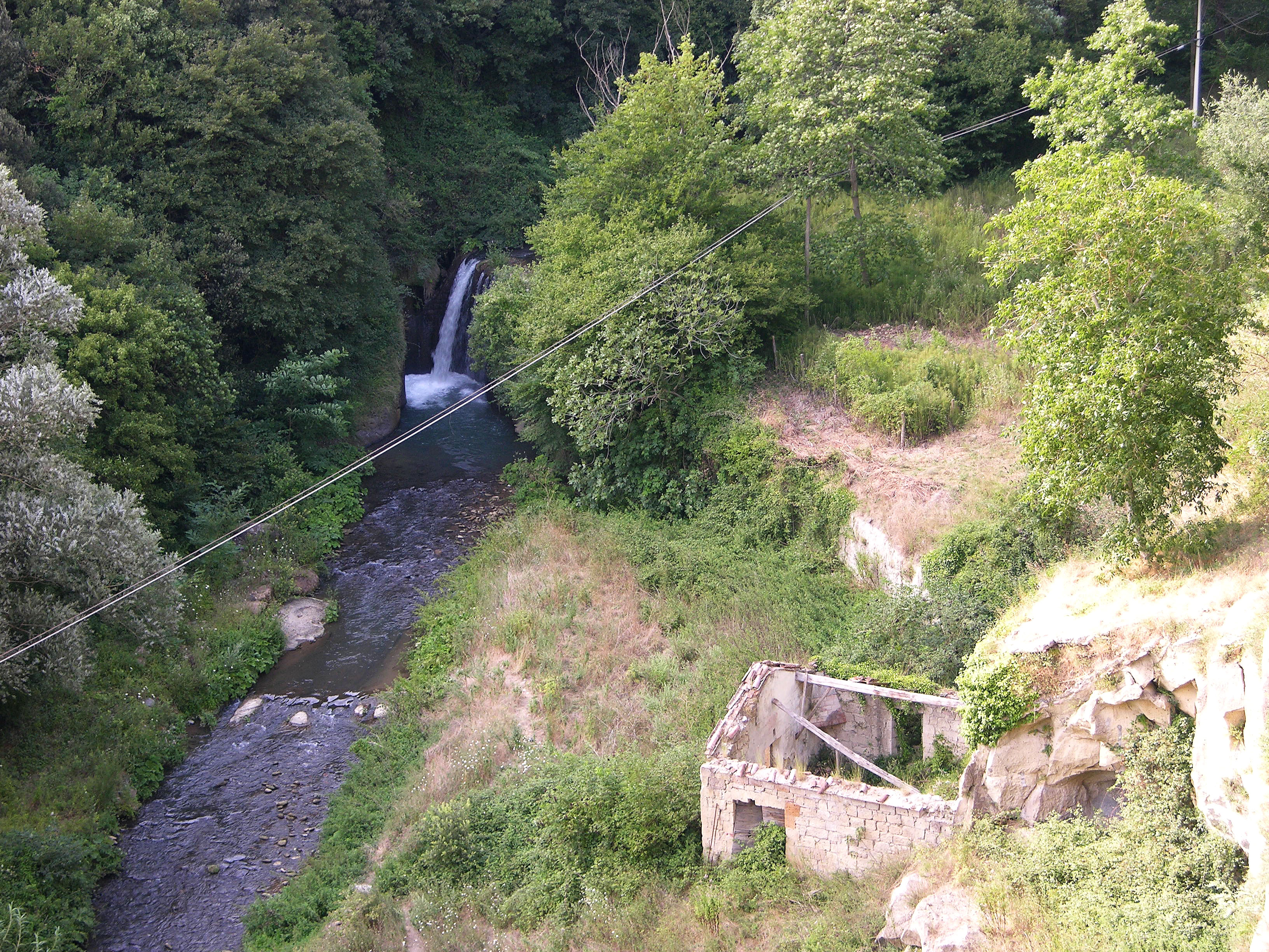 Fiume Lente visto da Sorano (GR). Particolare della cascata ed il vecchio mulino.